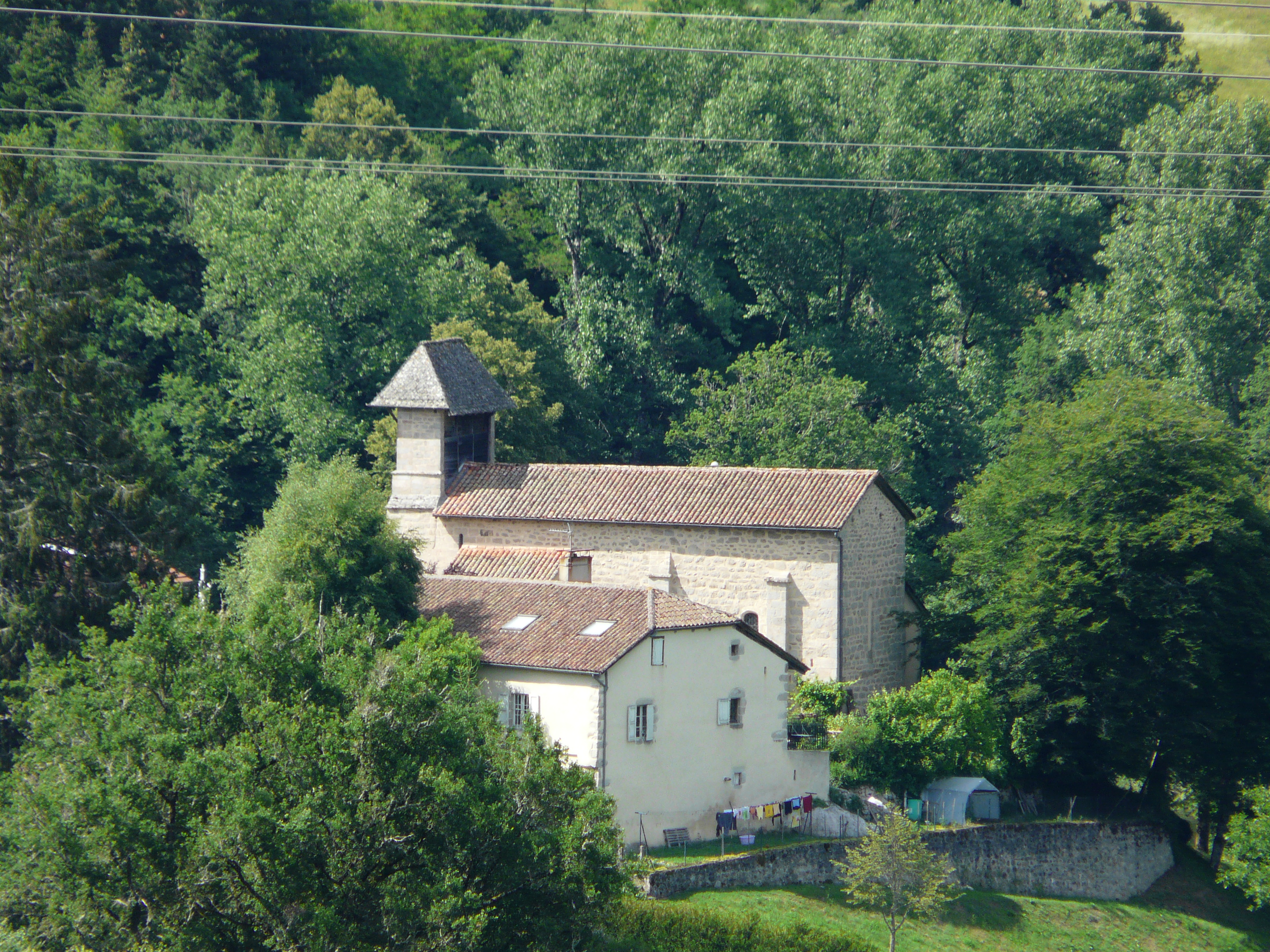 L'église Saint-Gérons de Saint-Gérons, Cantal, France. Vue prise depuis le barrage de Saint-Étienne-Cantalès.